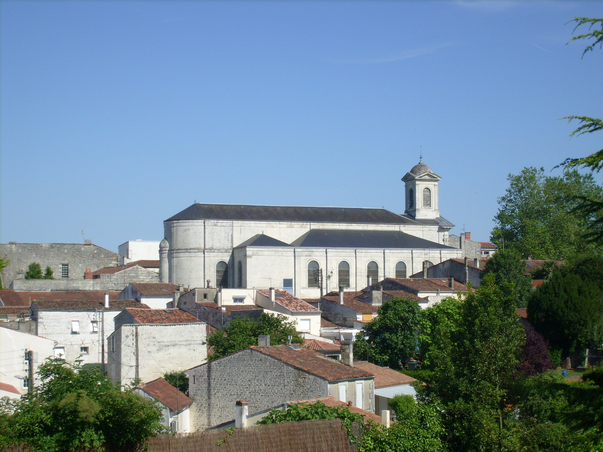 Eglise Saint-Vivien de Saintes